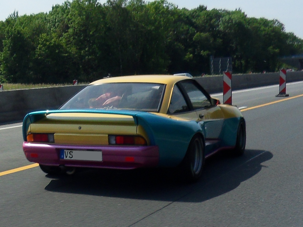 Opel Manta mit Breitbausatz der Fa. Mattig